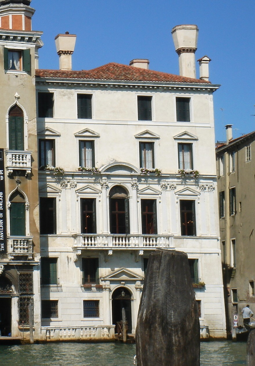 Venezia: Palazzo Smith Mangilli Valmarana sul Canal Grande.